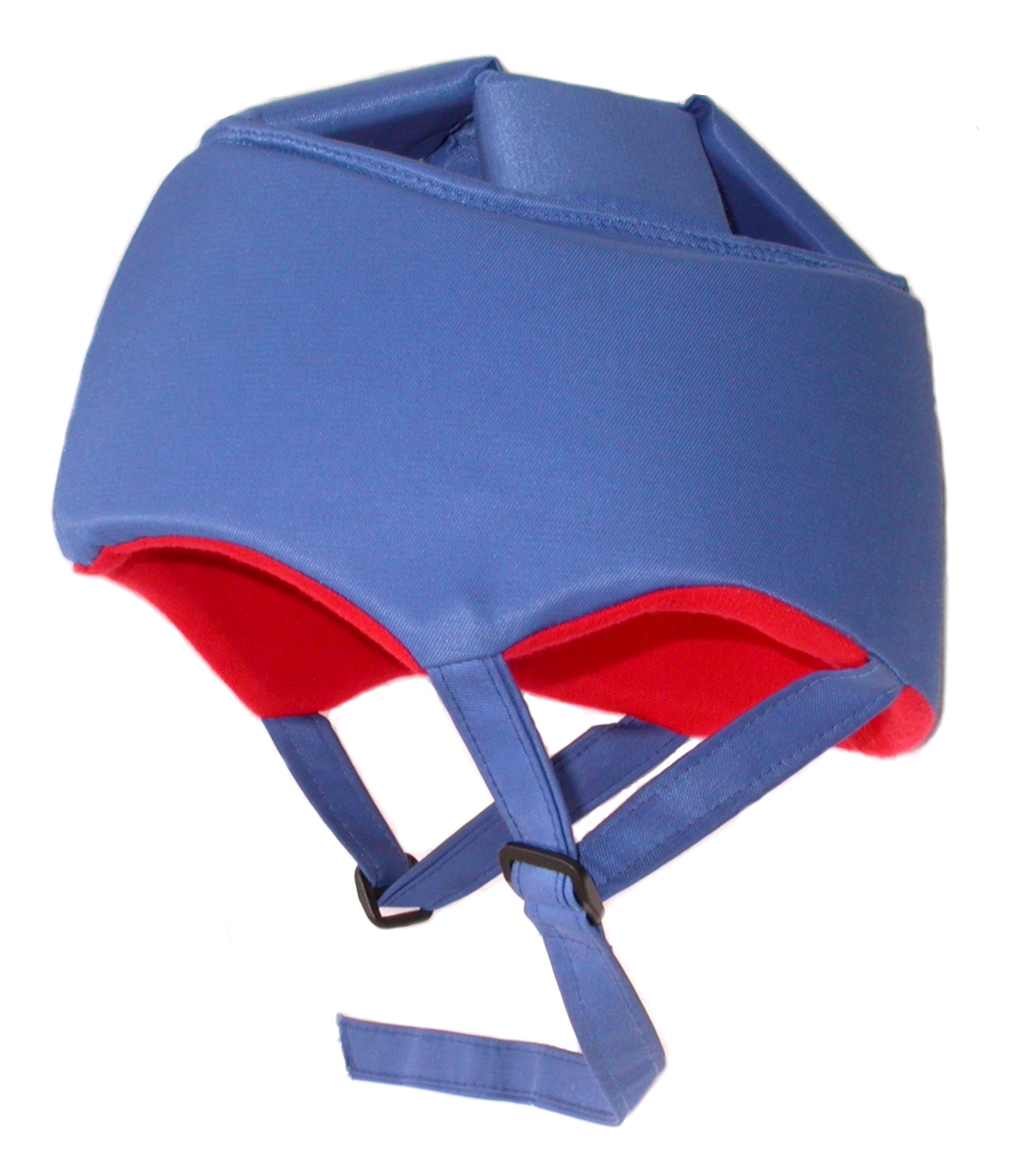 eplilepsy helmet, seizure helmet, headgear